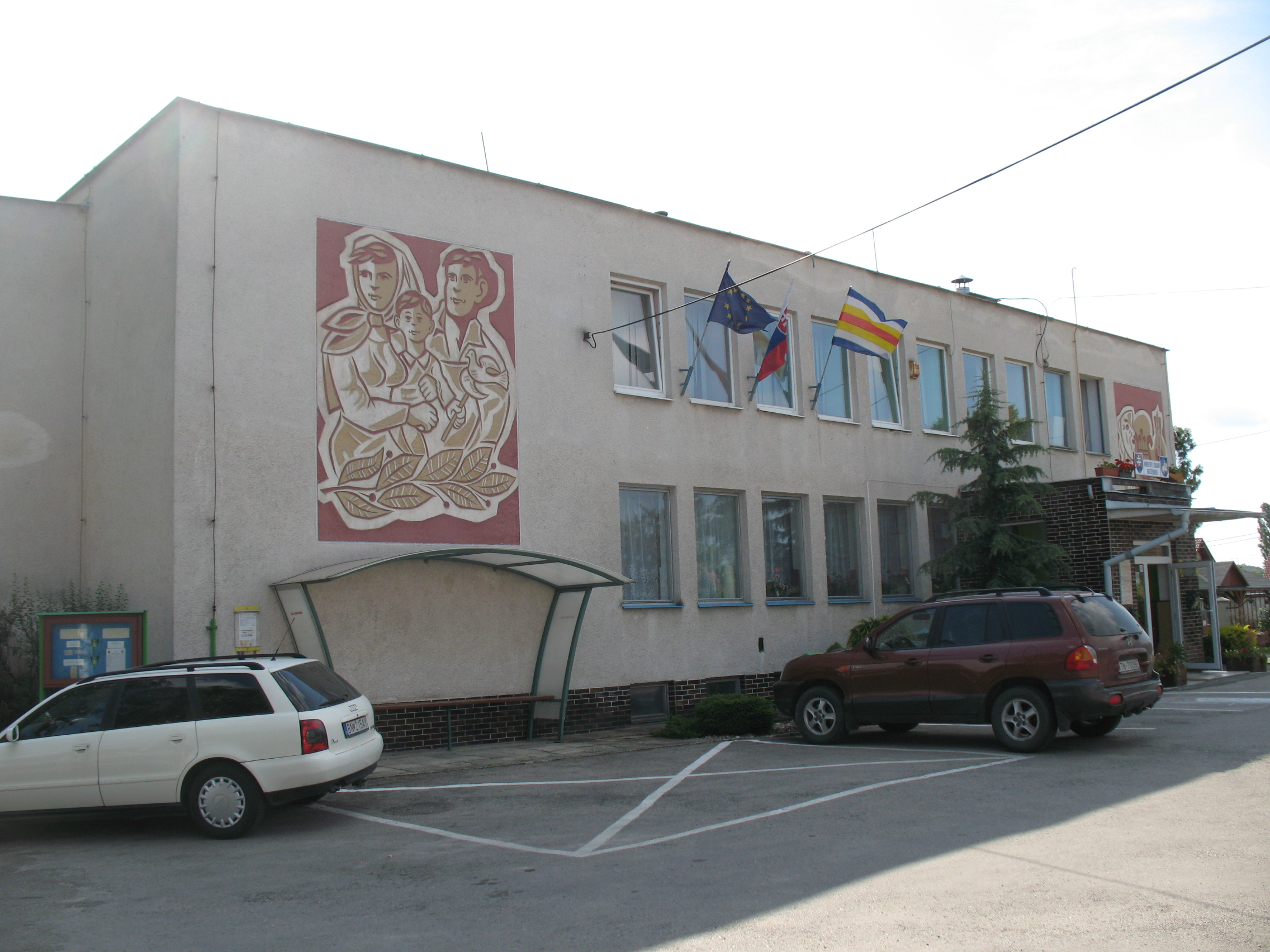 Dezsér